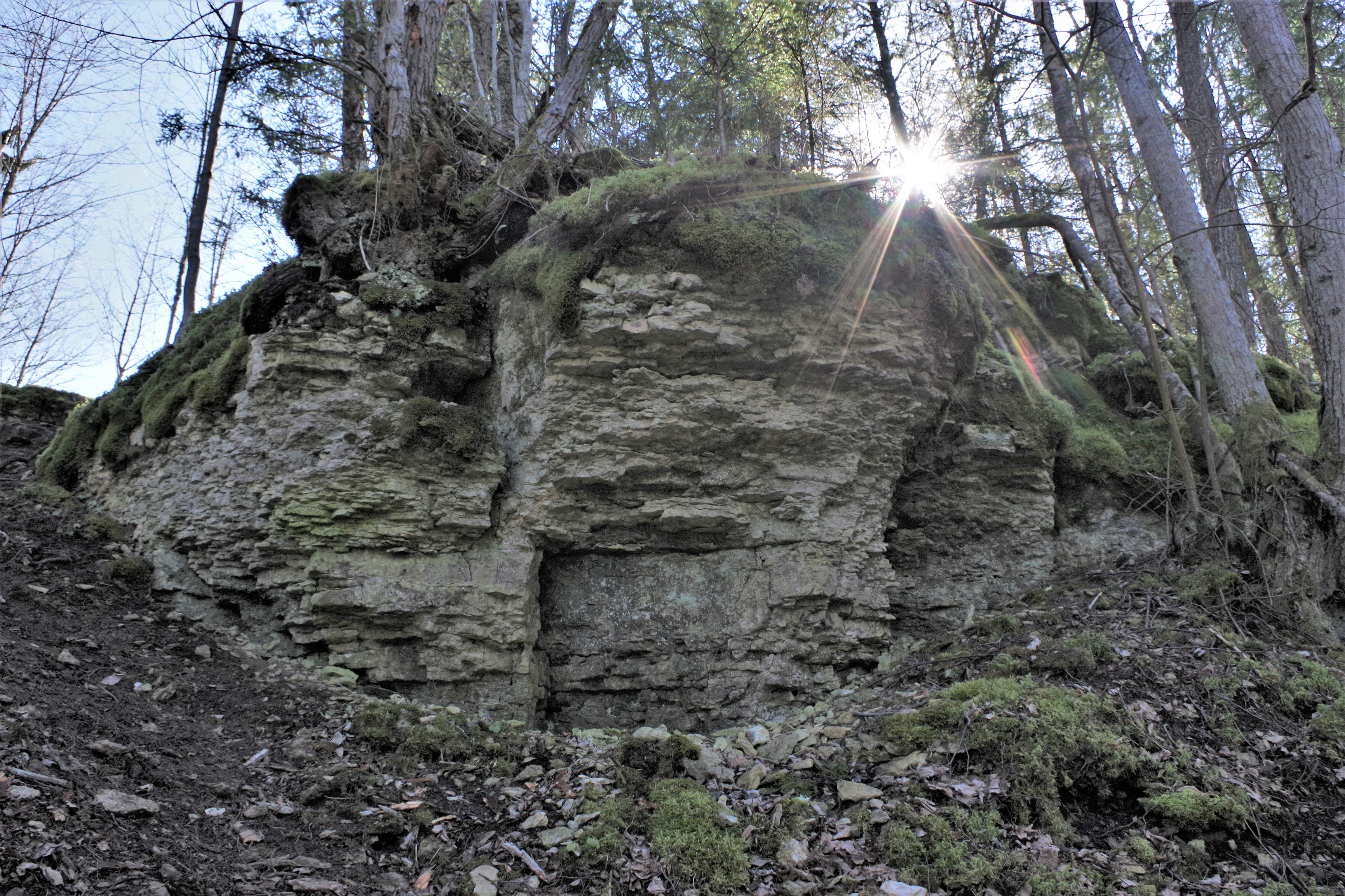 Ubari pank on osa Põhja-Eesti klindist ja asub Ubari maastikukaitsealal